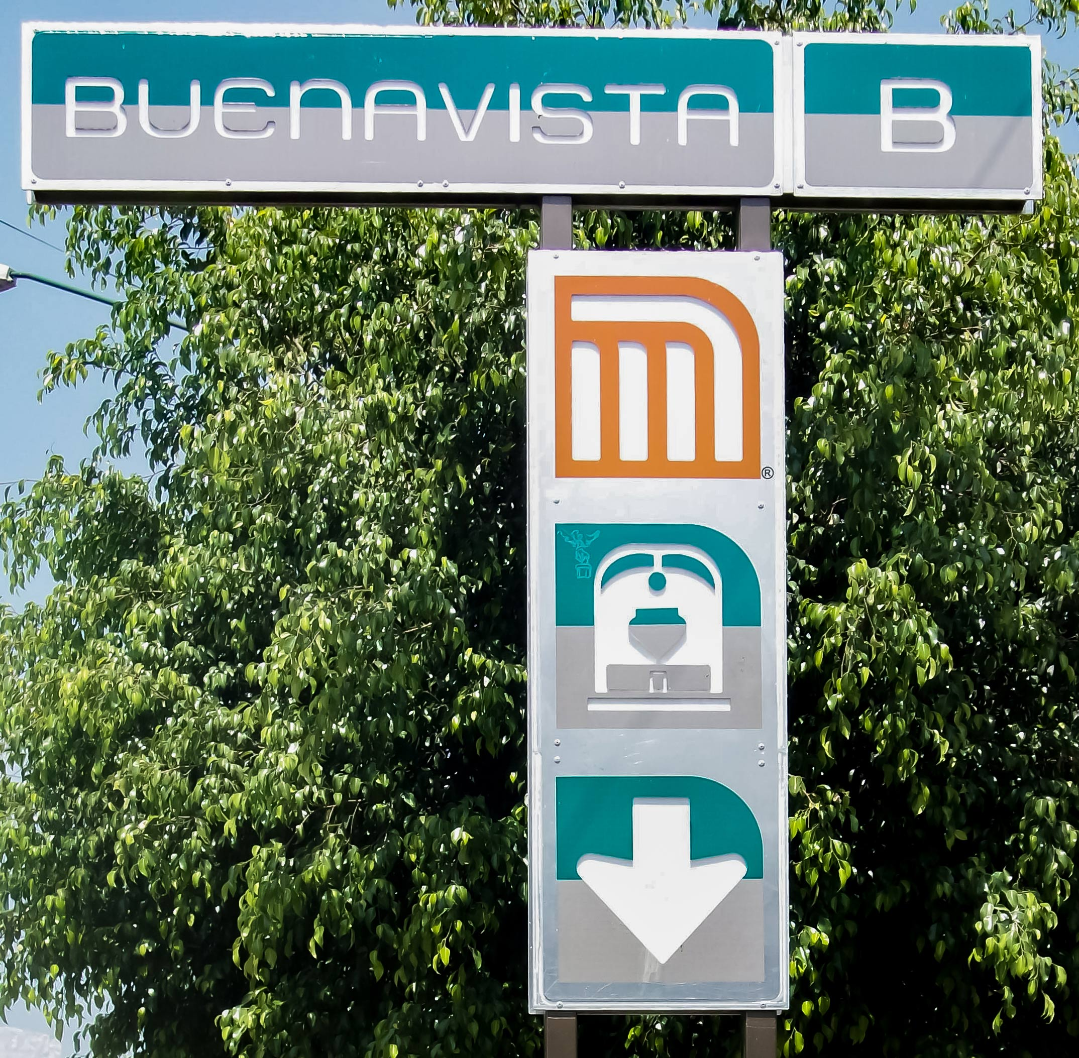 Letrero estacion Buenavista